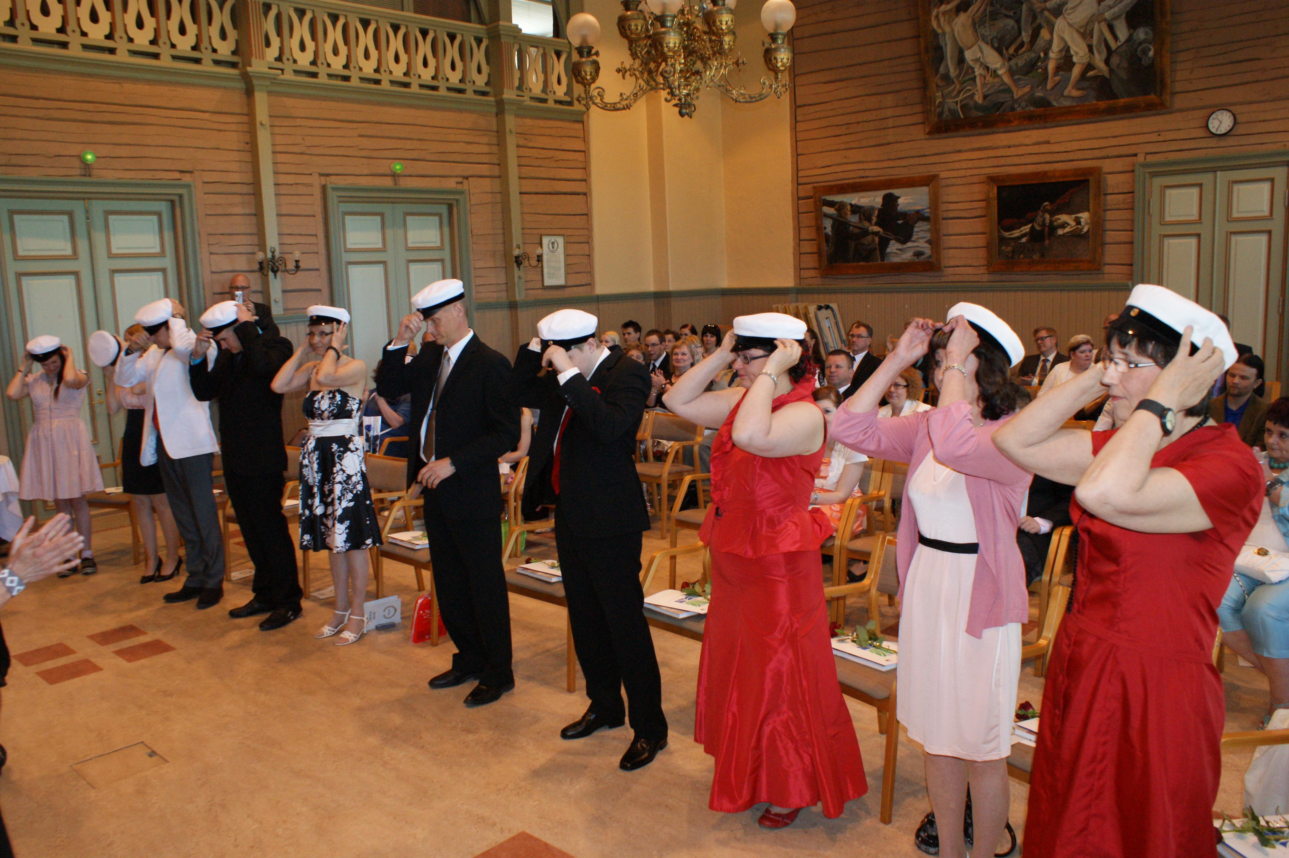 Otavan Opiston uusia ylioppilaita keväällä 2011